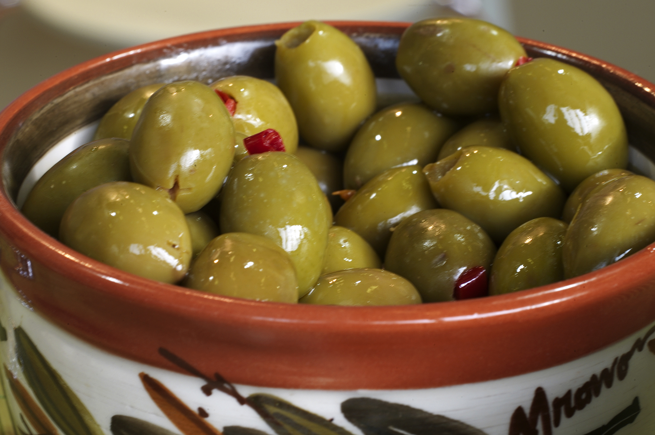 INRA, Jean Weber